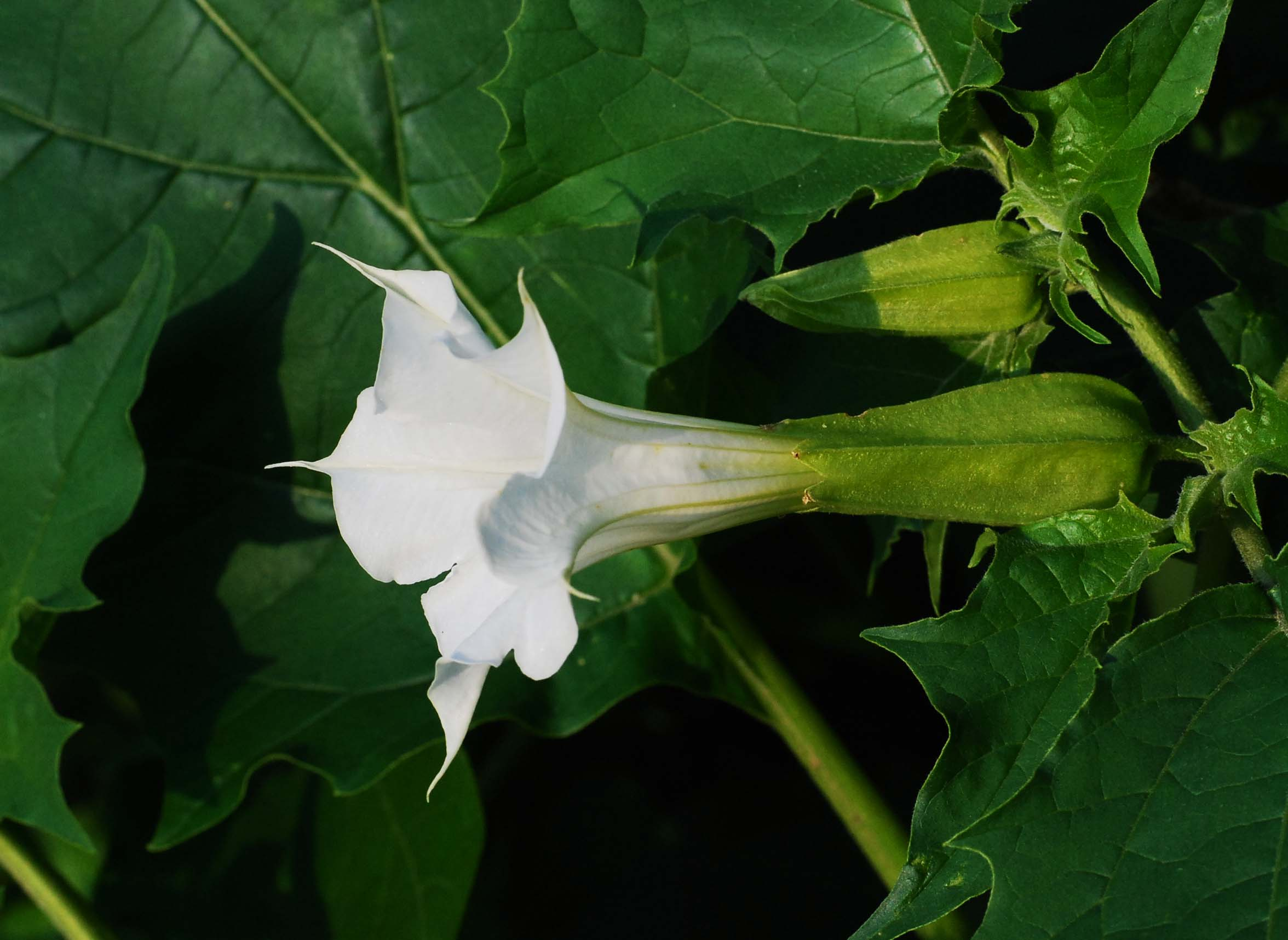 Datura stramonium, fleur, Jardin des Plantes de Paris